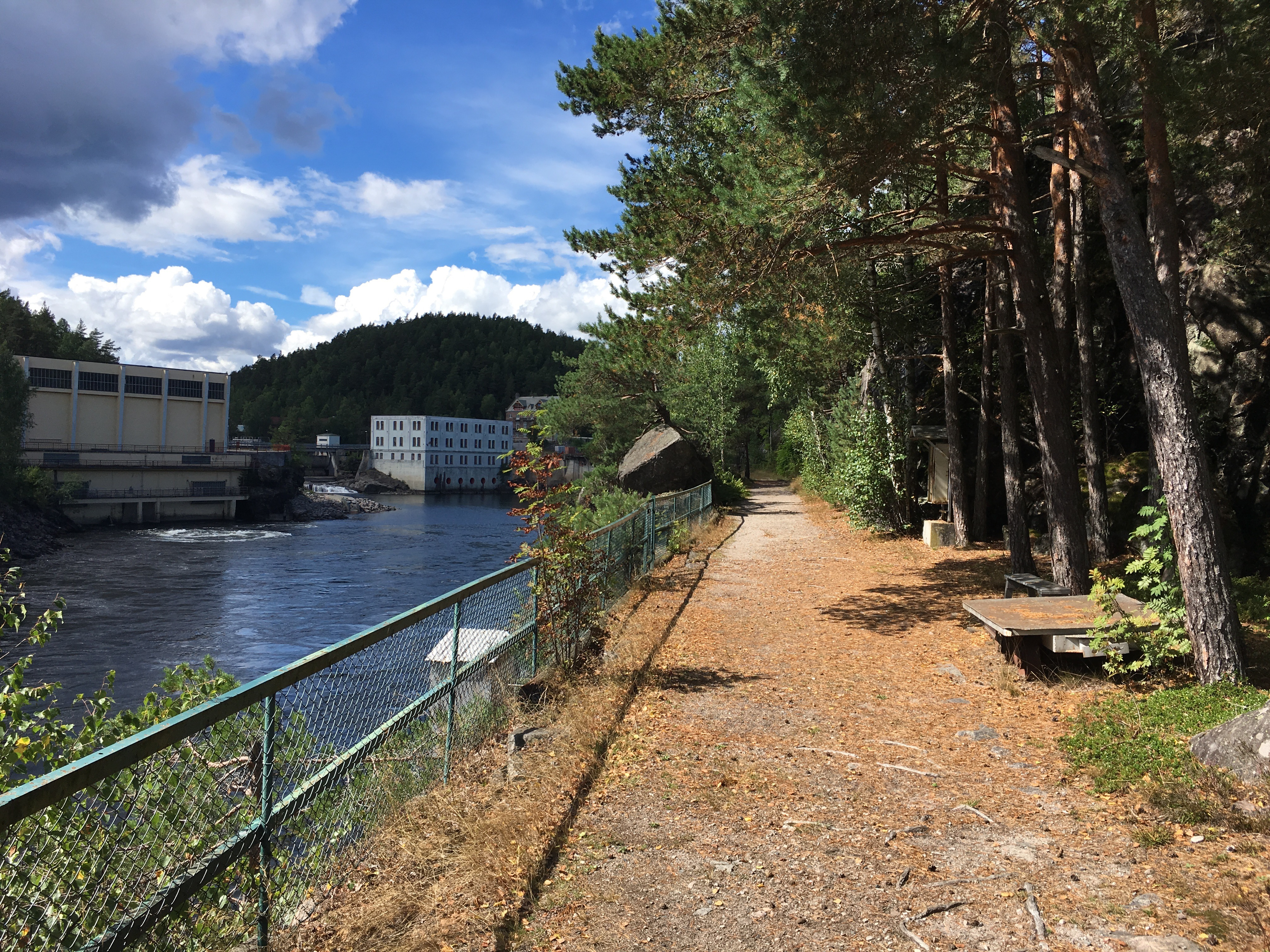 Trasé fra den gamle jernbane fra Skotfos Brug, Rørøåsen, Skotfoss